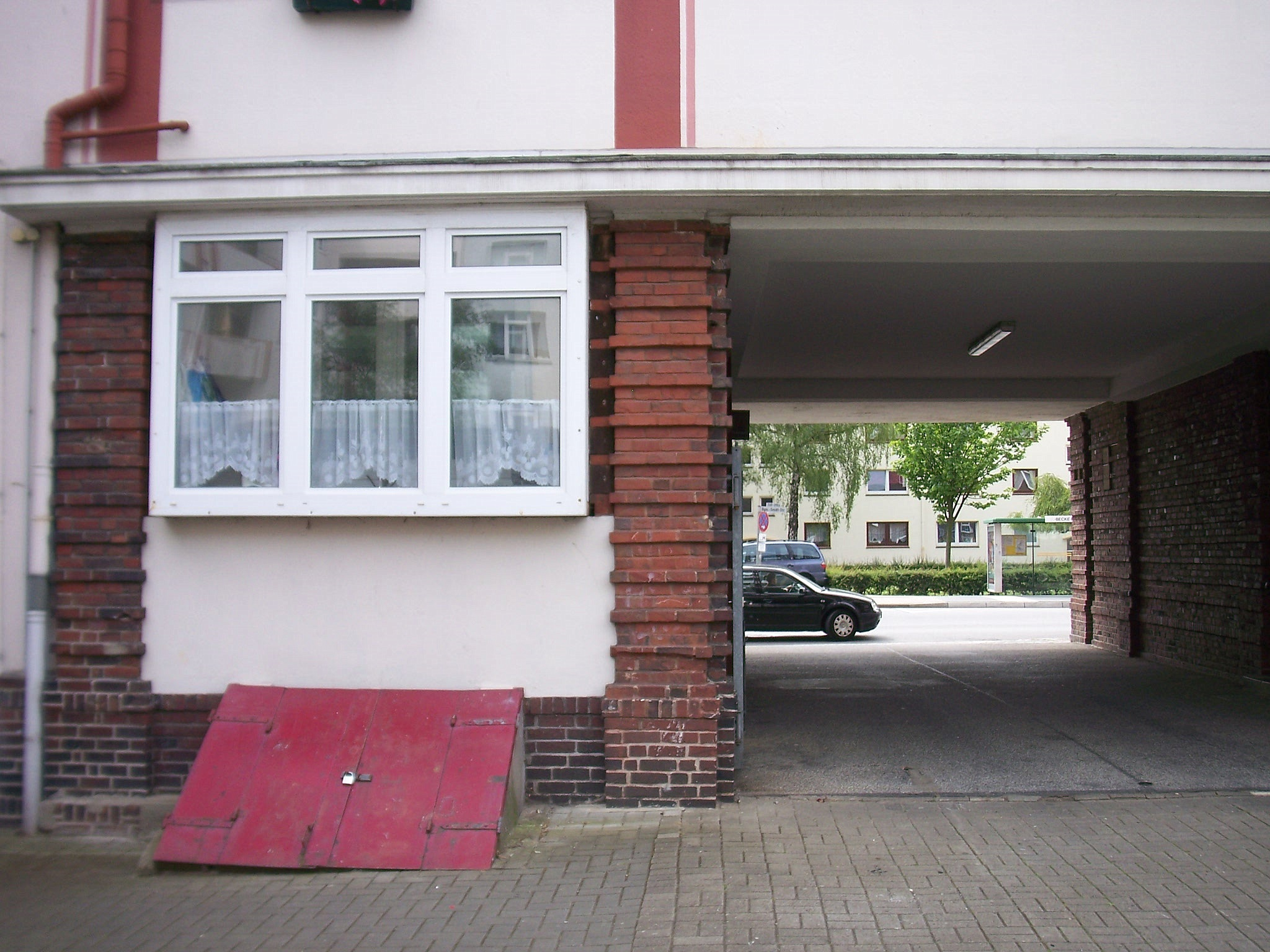 alte Kohlenrutsche